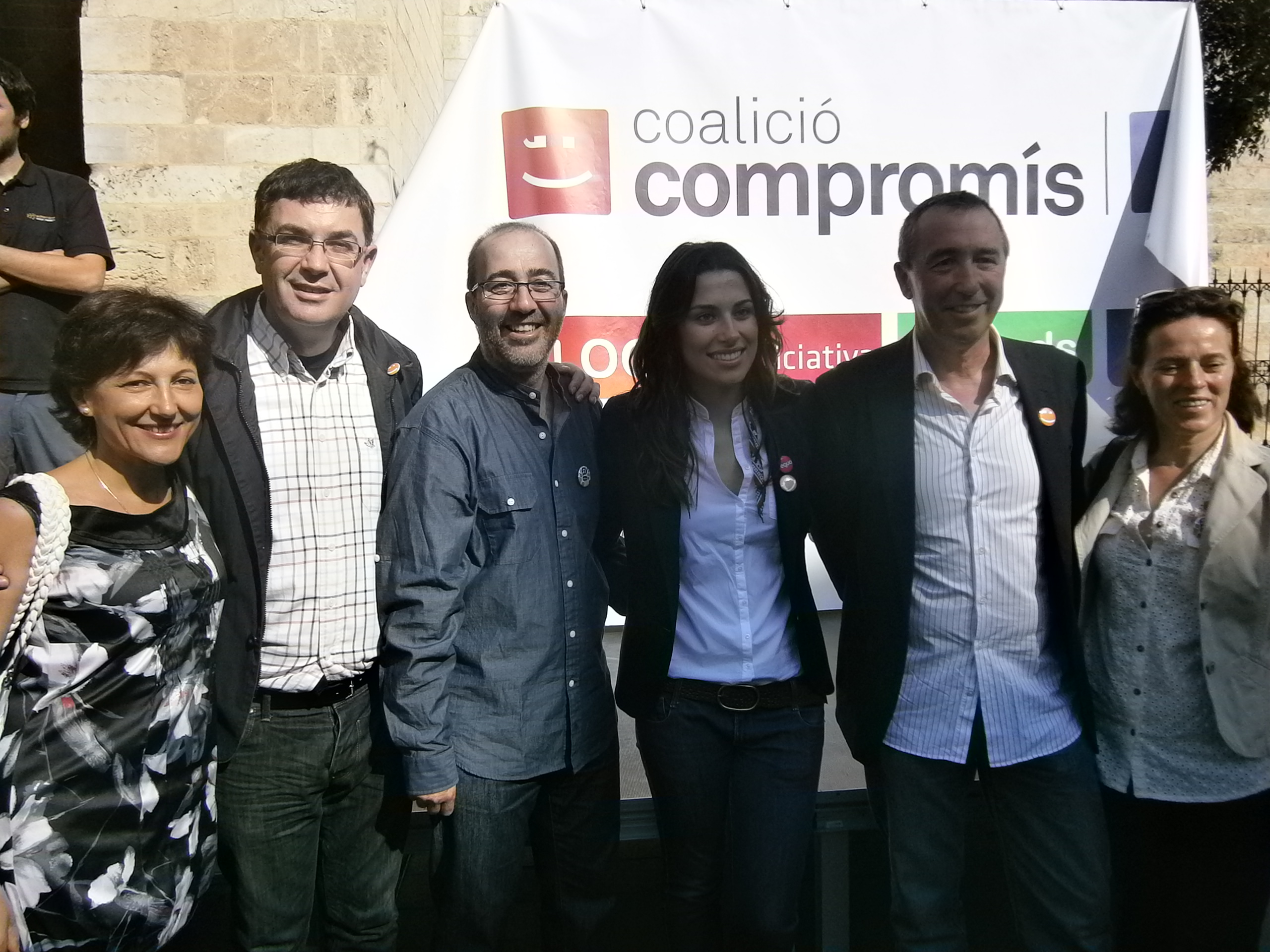 Acte de presentació de la candidatura de Compromís a les eleccions generals de 2001 en les Torres de Serrans, amb Cristina Domingo, Enric Morera, Diego Gómez, Aitana Mas i Joan Baldoví.